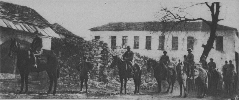 Le Miroir n°185 page 1 : cf titre .